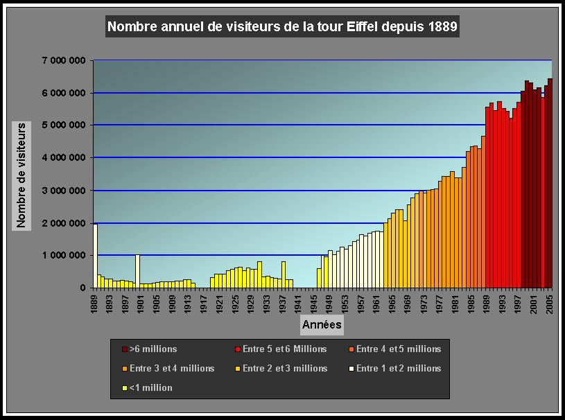 Fréquentation de la tour Eiffel de 1889 à 2005. Fichier réalisé par moi-même (Utilisateur:Kuxu) sous Excel, puis importé sous paint.